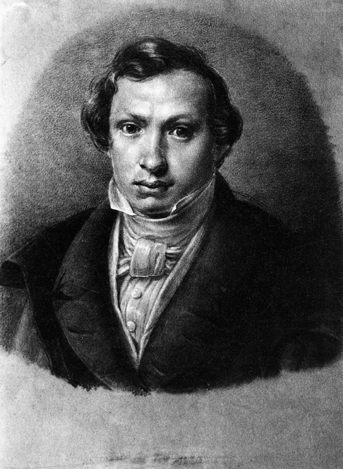 Bildnis des Malers Theobald von Oer (1807-1885), Kohlezeichnung, Kupferstichkabinett Dresden